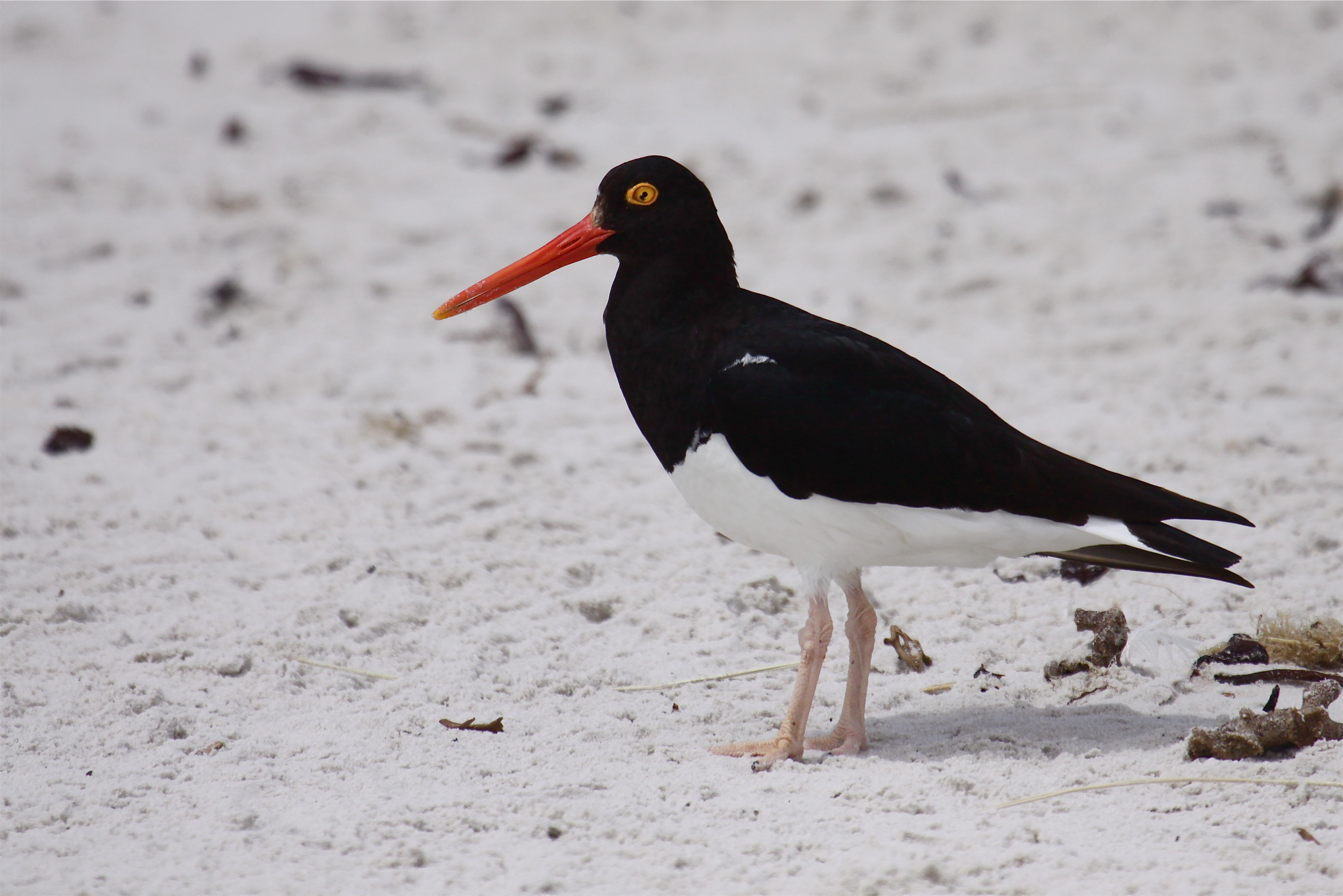 Falkland Islands